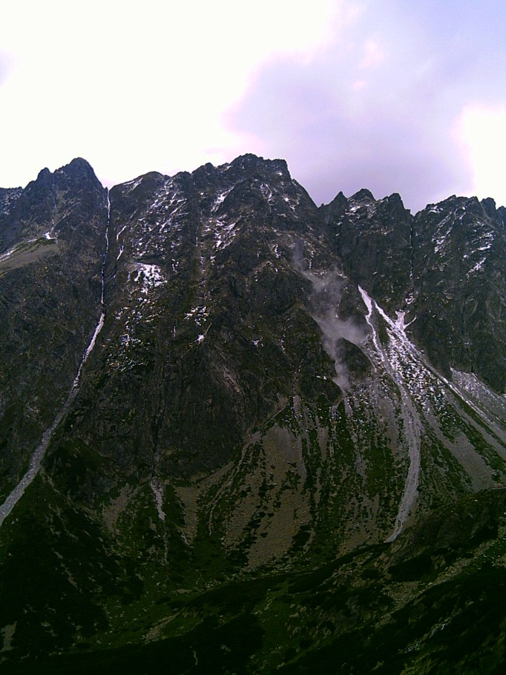 Mała lawina mieszana w Tatrach